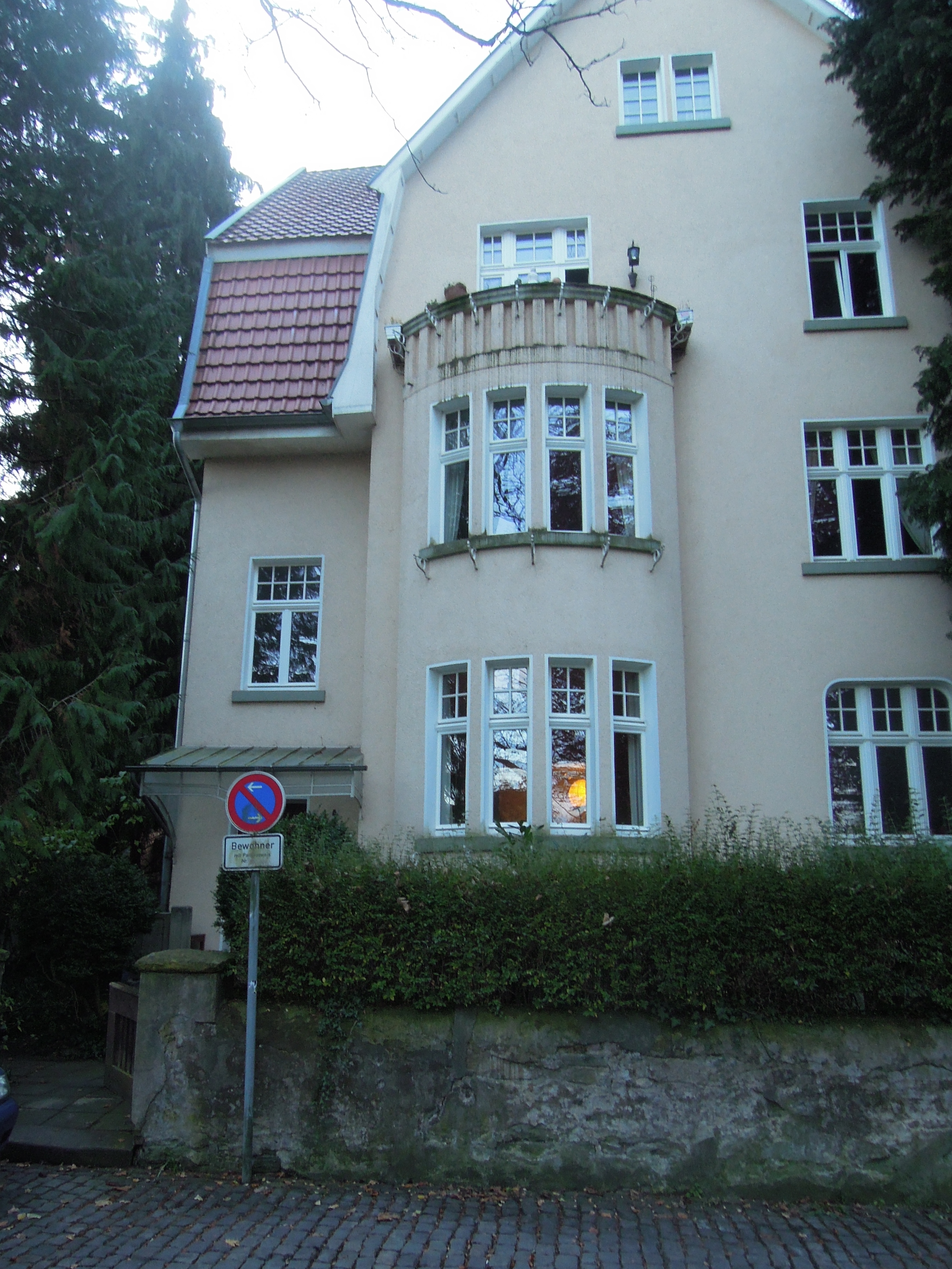 Stolpersteinlage in Soest Georgsgasse 4